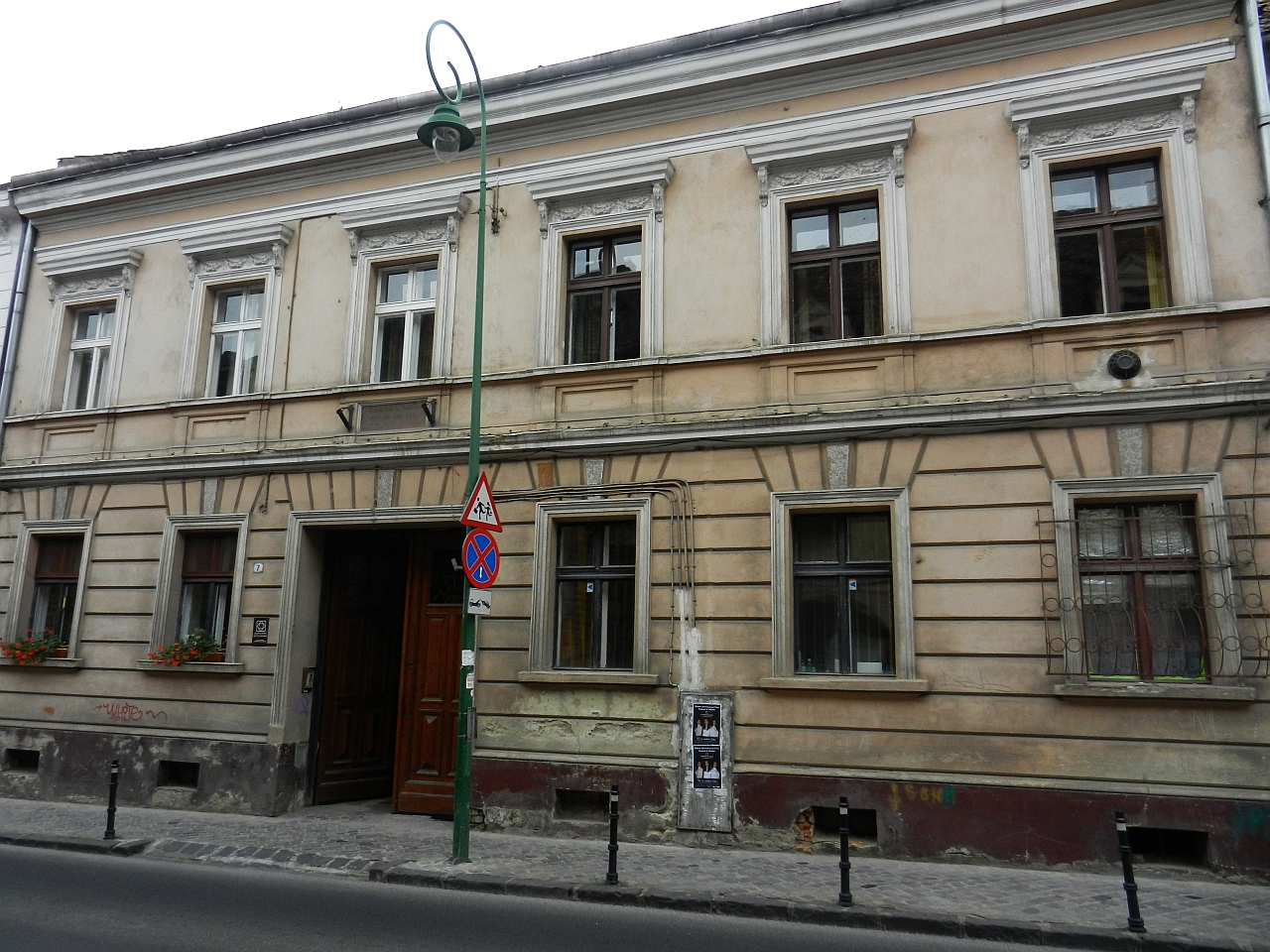 Casă monument istoric